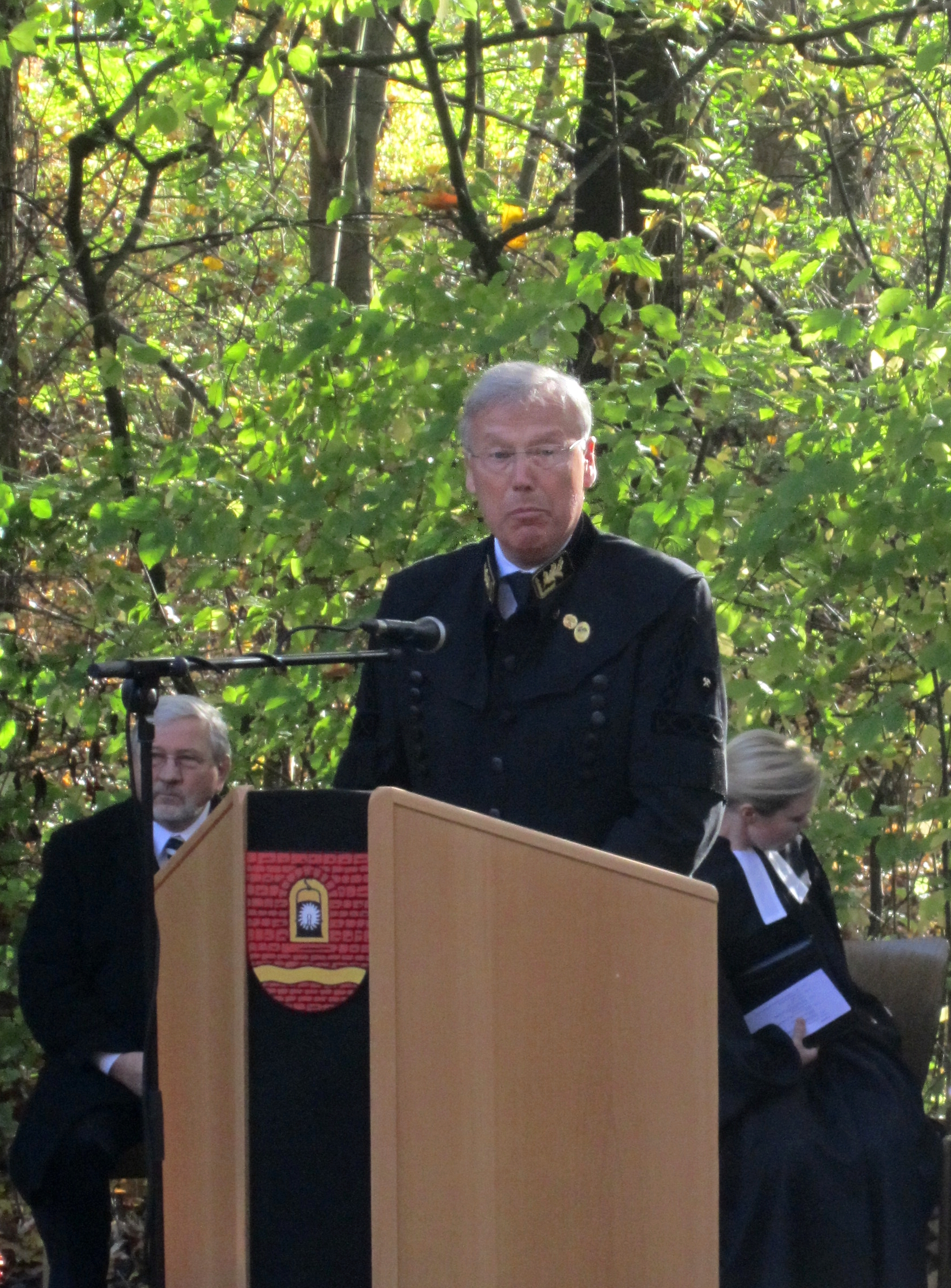 Rainer Slotta. Ansprache während der Gedenkveranstaltung zum 50. Jahrestag des Grubenunglückes von Lengede. Lengede-Broistedt, Niedersachsen, Deutschland.